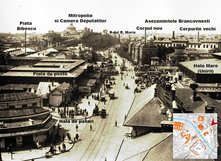 Piata Mare din Bucuresti, 1976